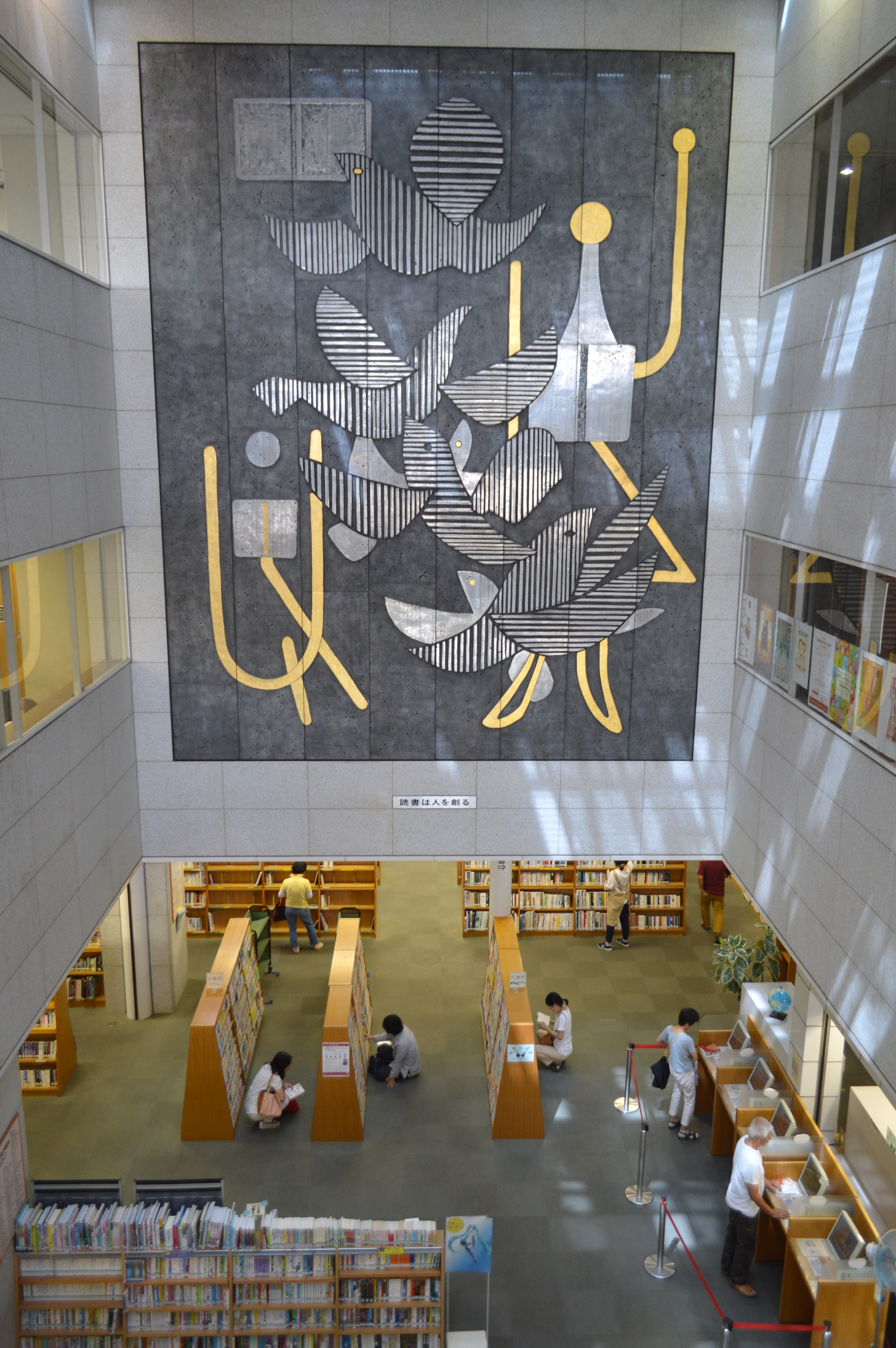 安城市城南町の安城市中央図書館1階-3階の吹き抜けにある壁画『読書は人を創る』。